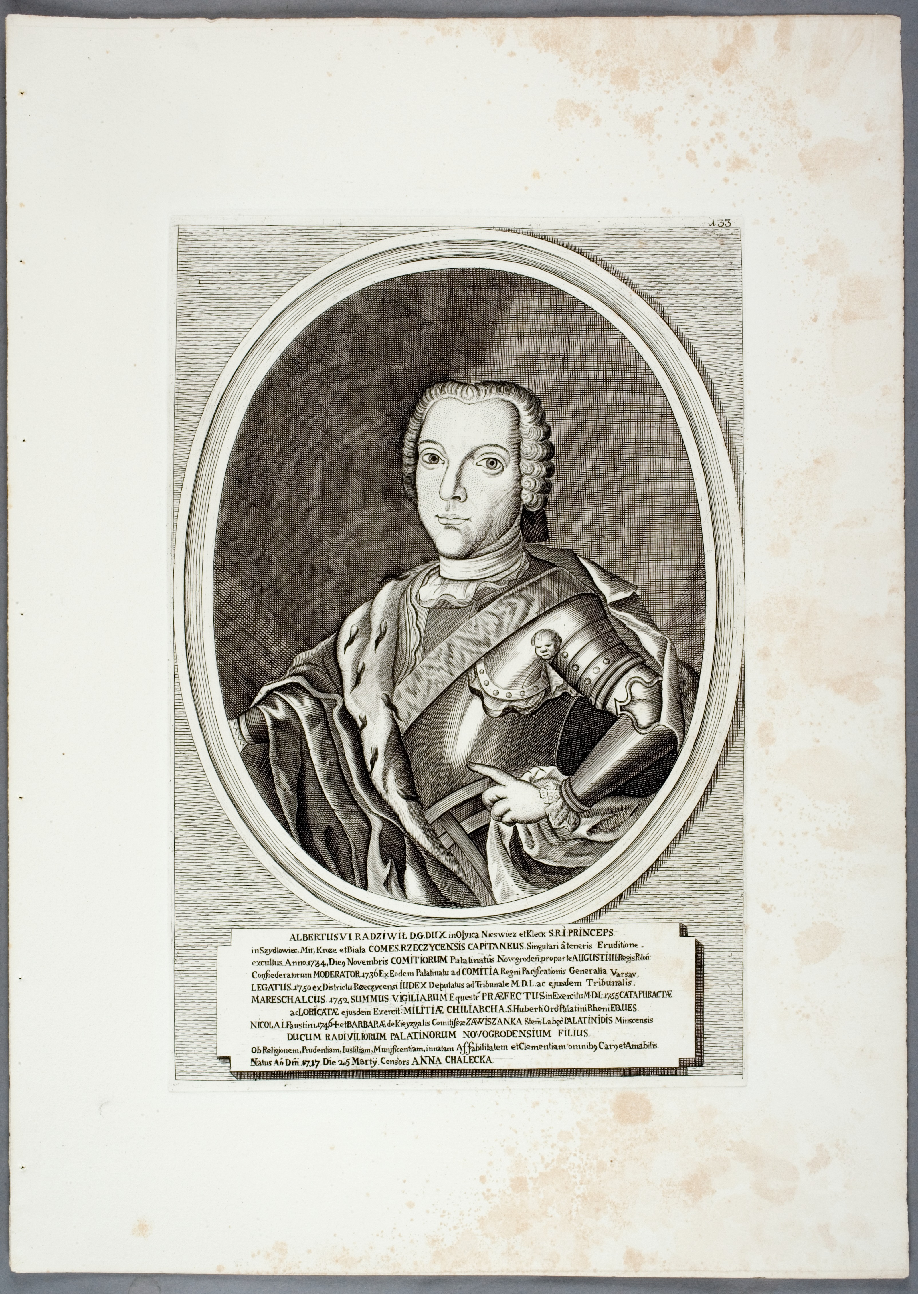 Беларуская (тарашкевіца): Партрэт Альбрэхт Радзівіла (Albrecht Radzivił)